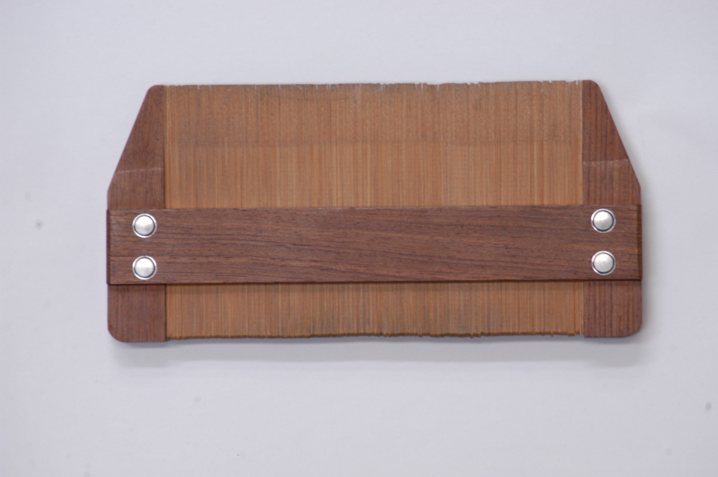 考古学において遺物の形状を図化する際に用いる道具